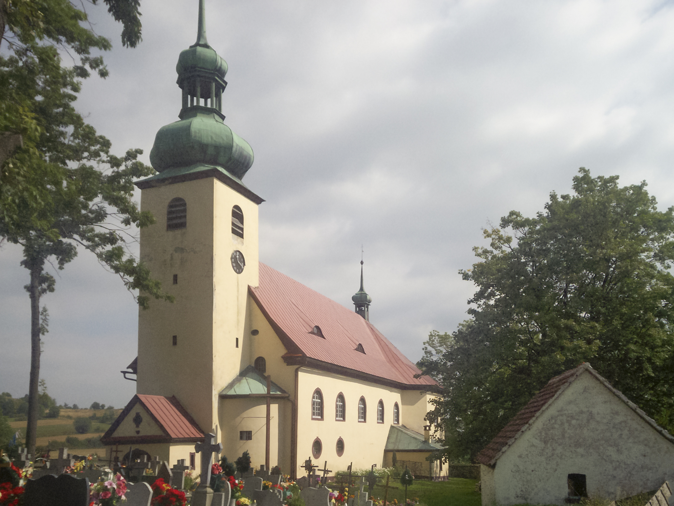 Opawa, preĝejo patronata de Sankta Hedviga.